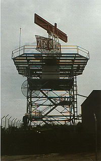 zelf gemaakt